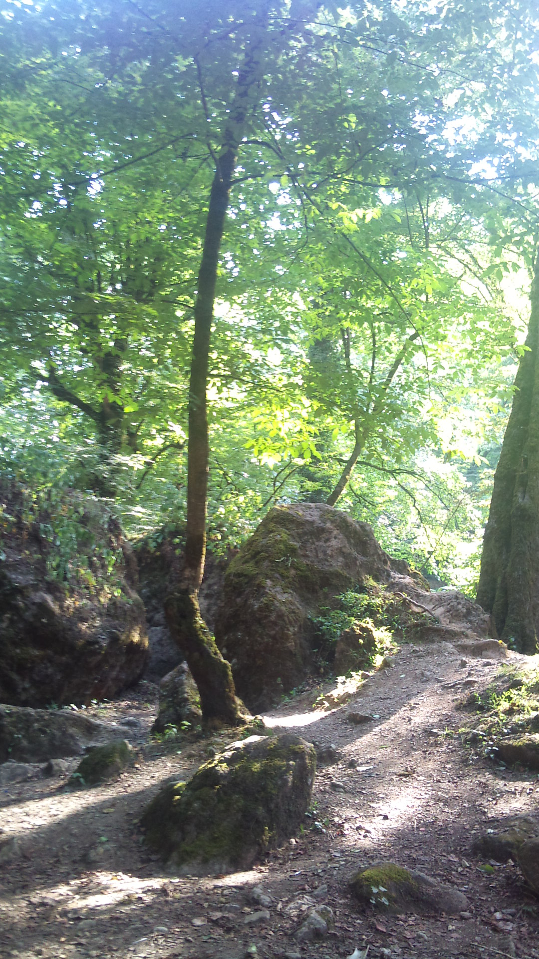 جنگل گیلان